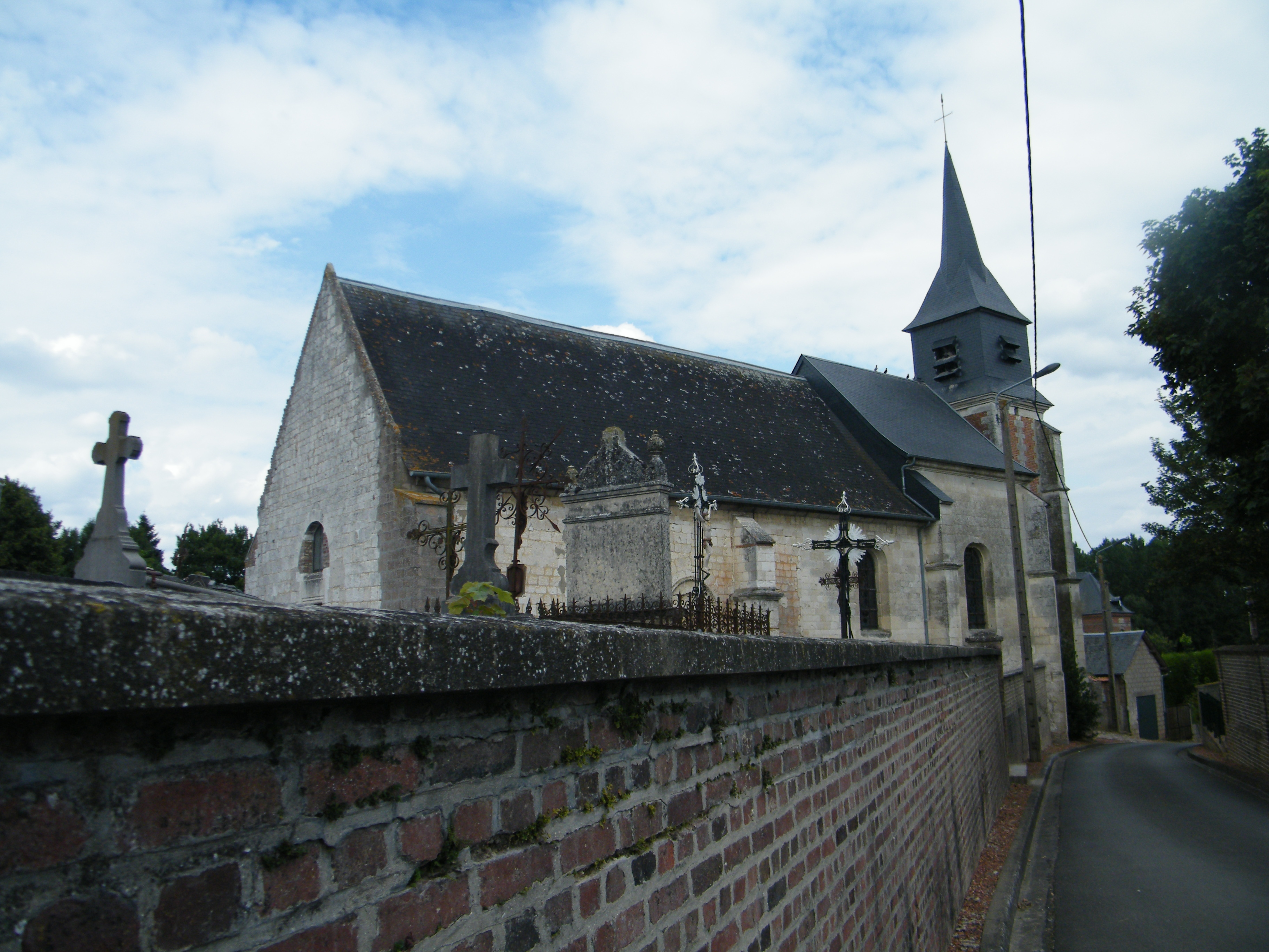 église.